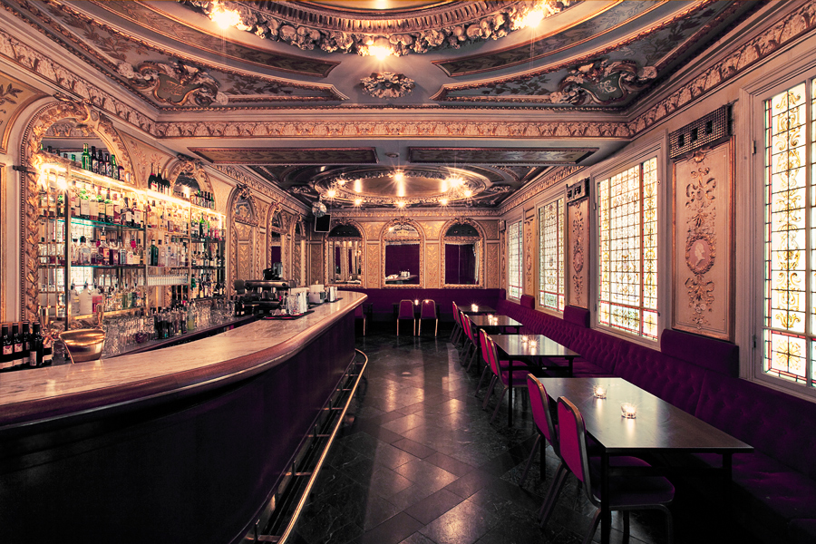 1800-talsbaren